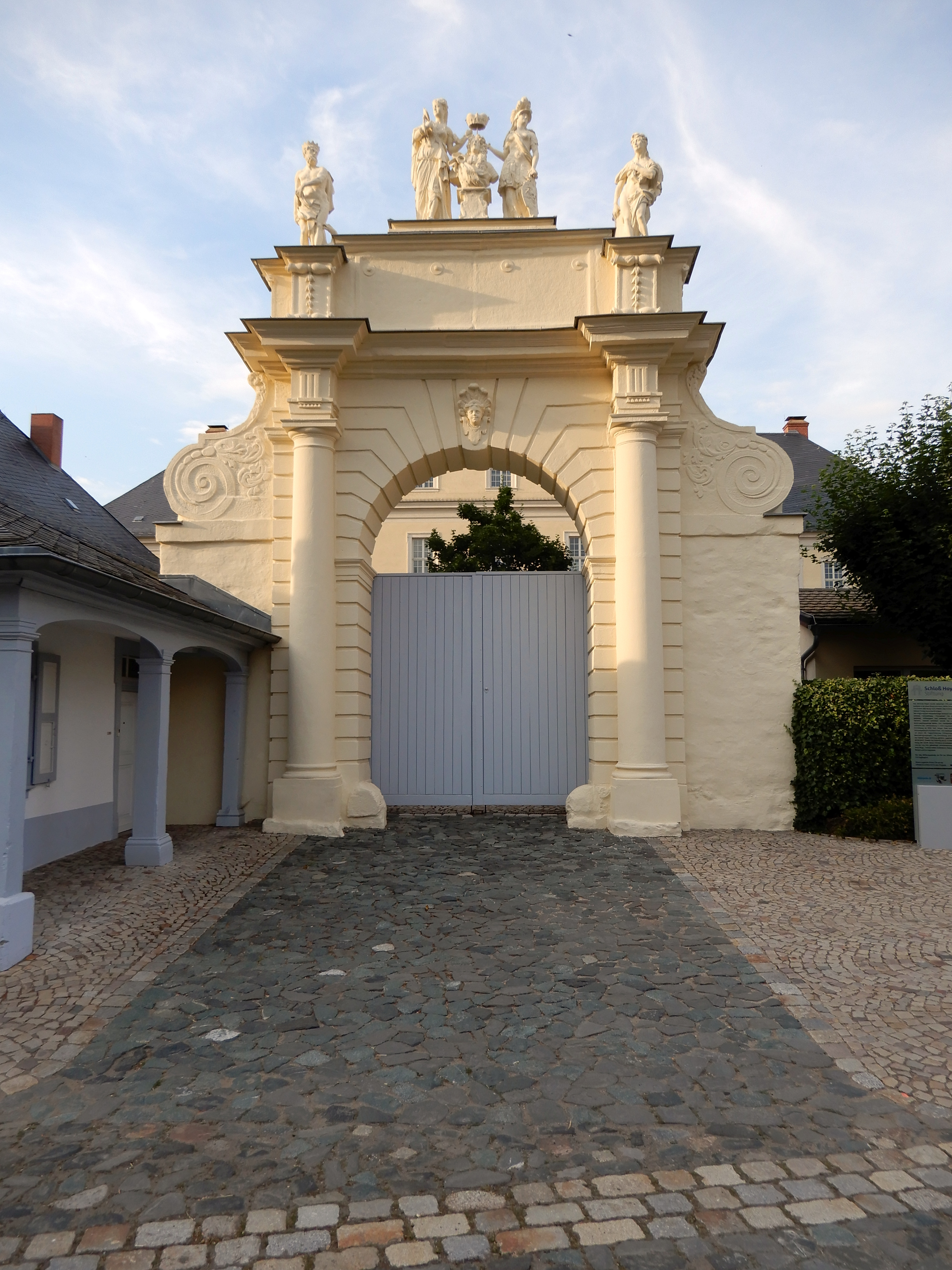 Torbogen des Schloss Hoym